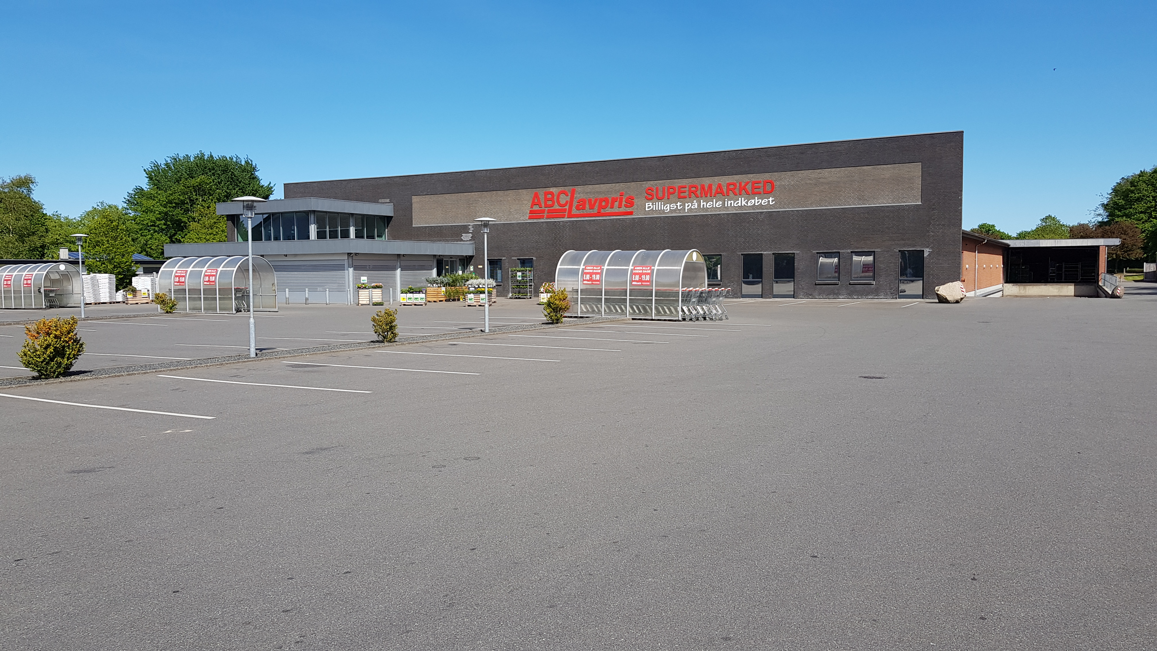 ABC Lavpris i Holsted